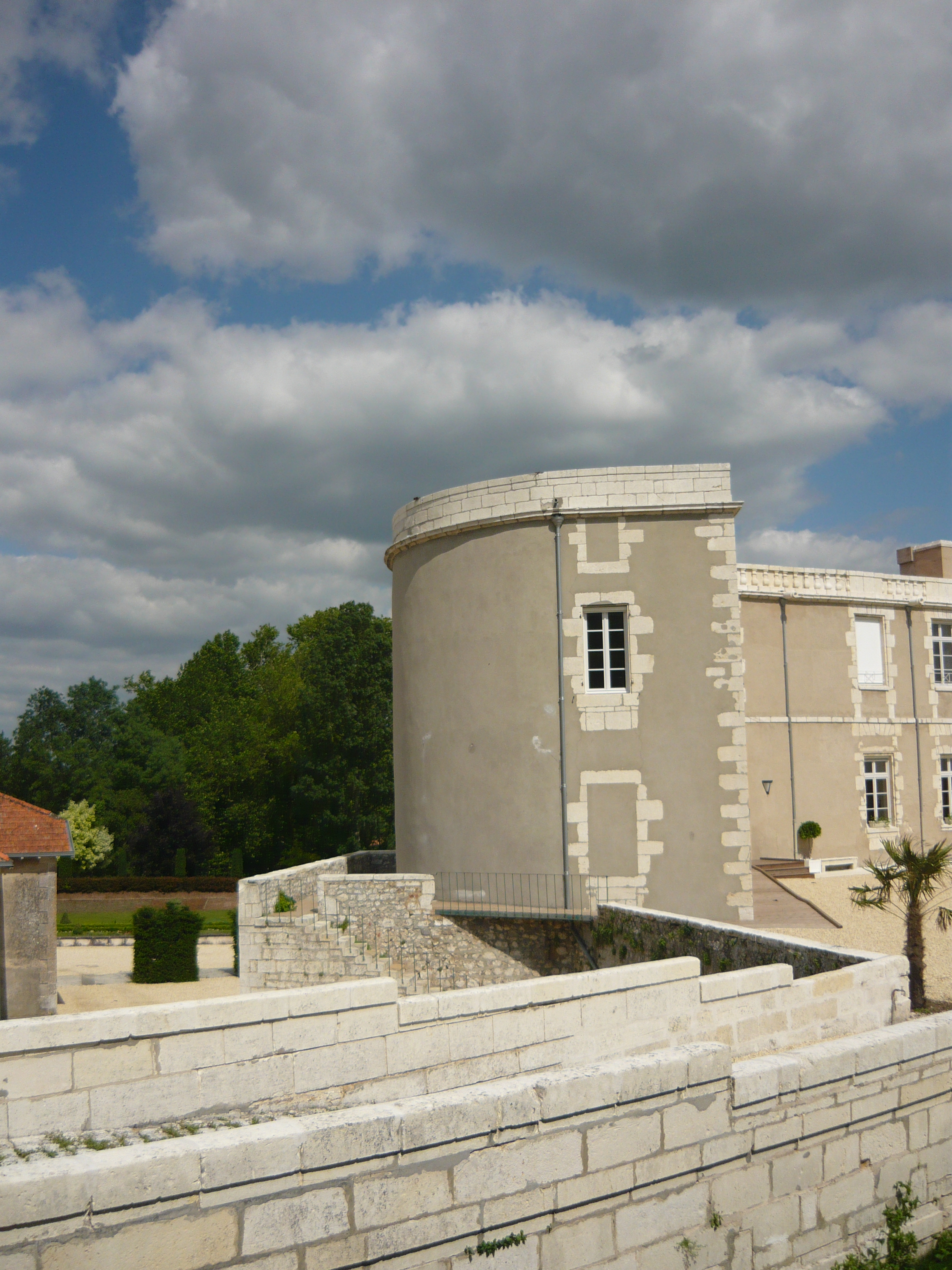 Tour ronde du château de Rochechouart de Tonnay-Charente, unique vestige de l'époque médiévale.